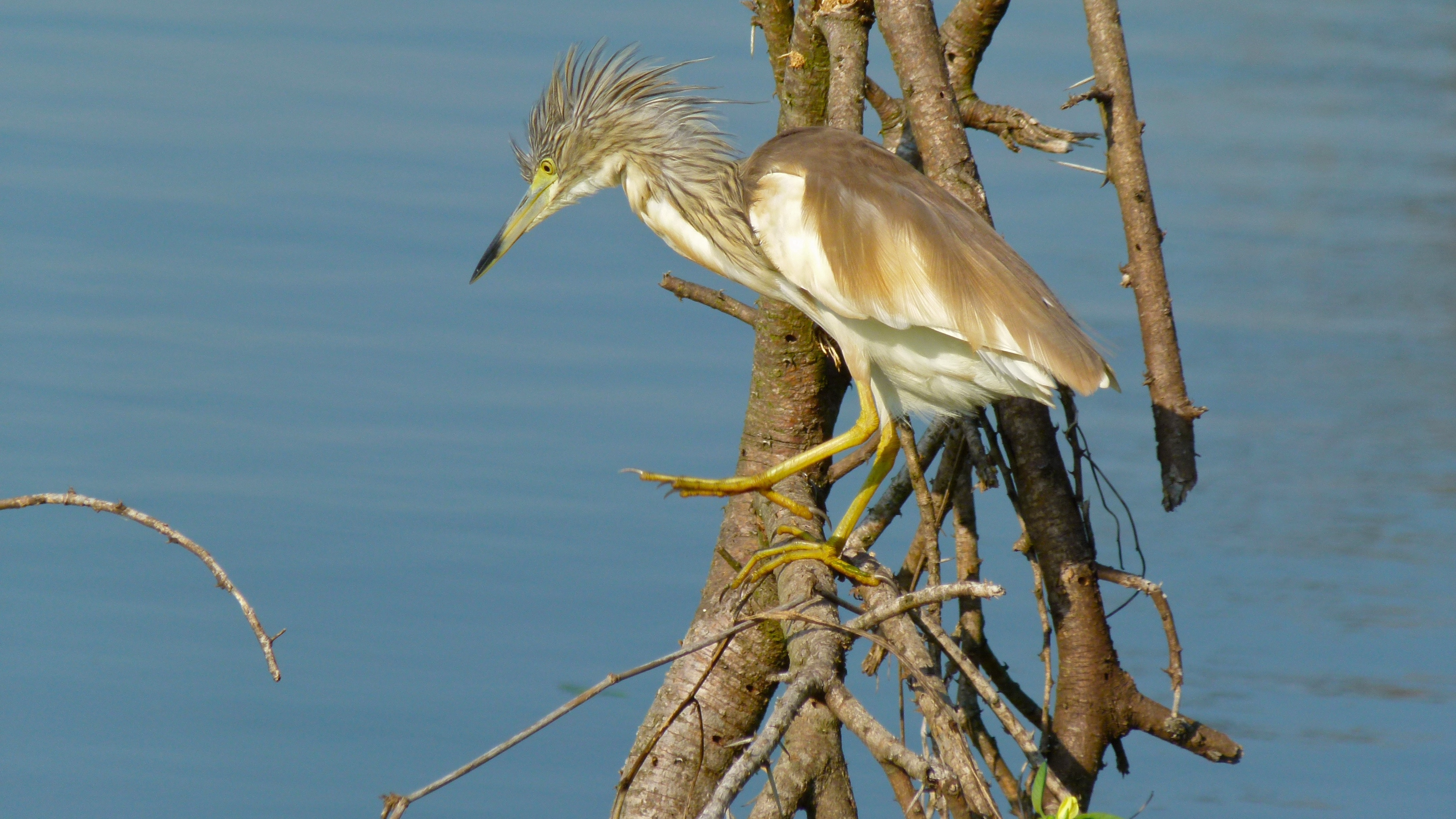 Sunset Dam Lower Sabie, Kruger NP, SOUTH AFRICA